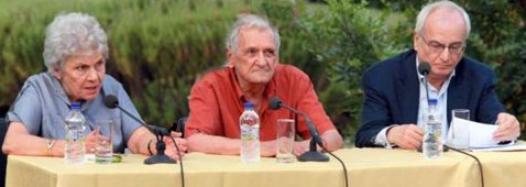 Η ποιήτρια Κική Δημουλά, ο ποιητής Τίτος Πατρίκιος και ο πανεπιστημιακός Νάσος Βαγενάς στον κήπο του Μεγάρου Μουσικής Αθηνών, 6/7/2011